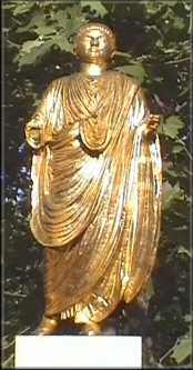 Emona